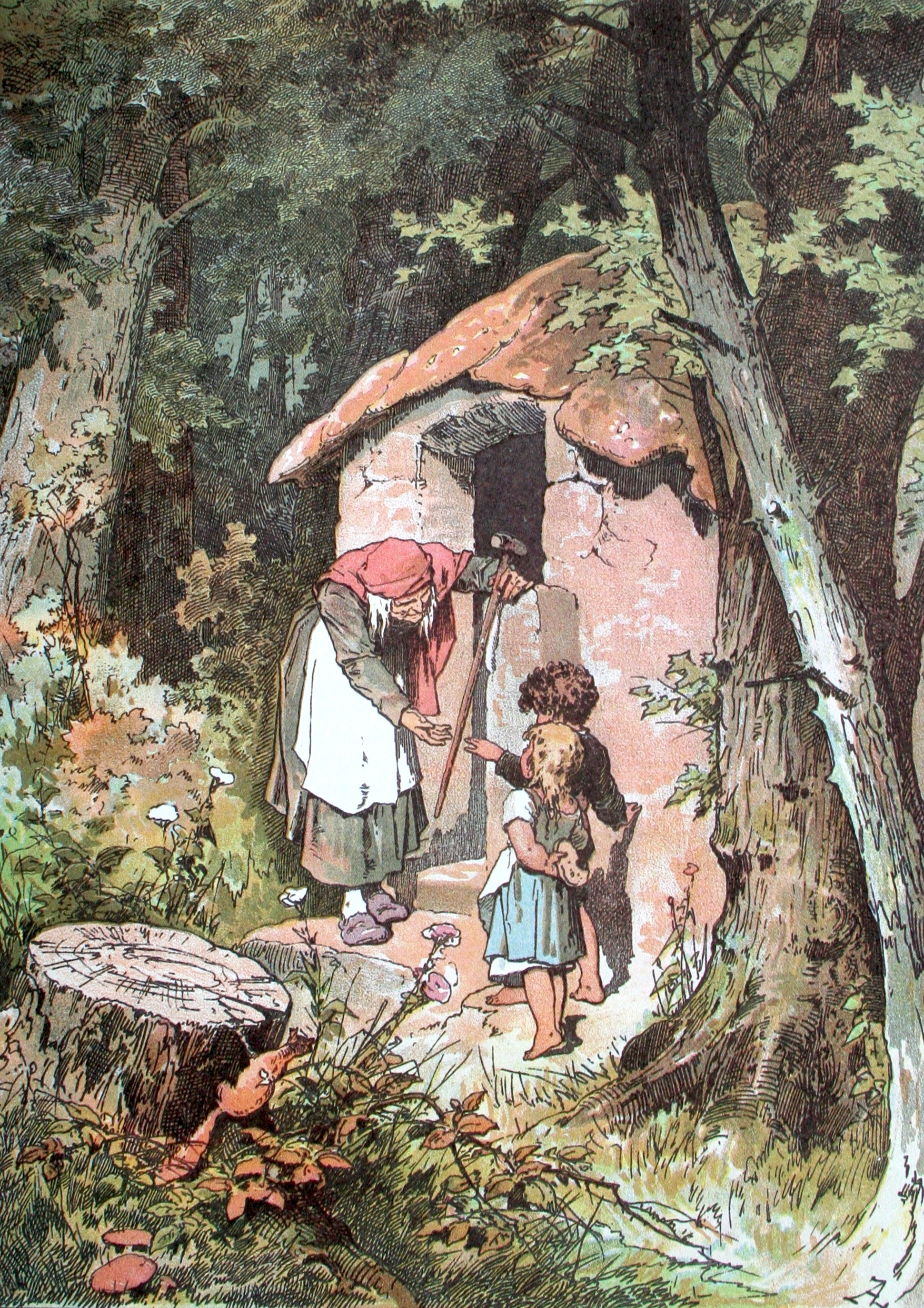 Hänsel and Gretel; Darstellung von Alexander Zick (1845 - 1907)